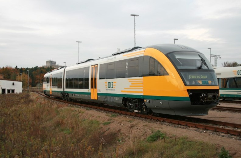 642 411 der Ostdeutschen Eisenbahn auf dem Betriebshof in Eberswalde Dolnoserbski: Pódzajtšnonimska zeleznica